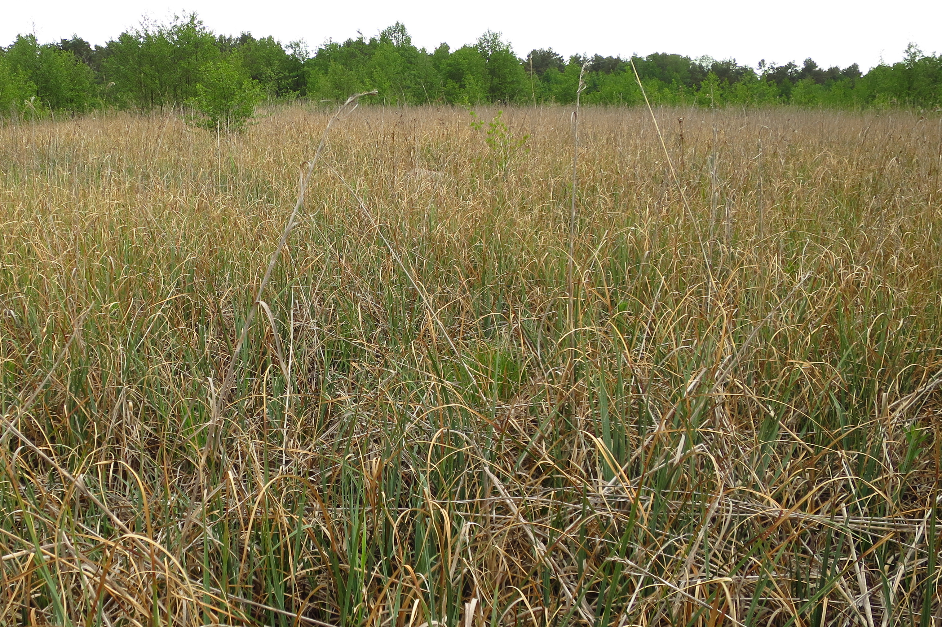 Silmi urgad Kihnus